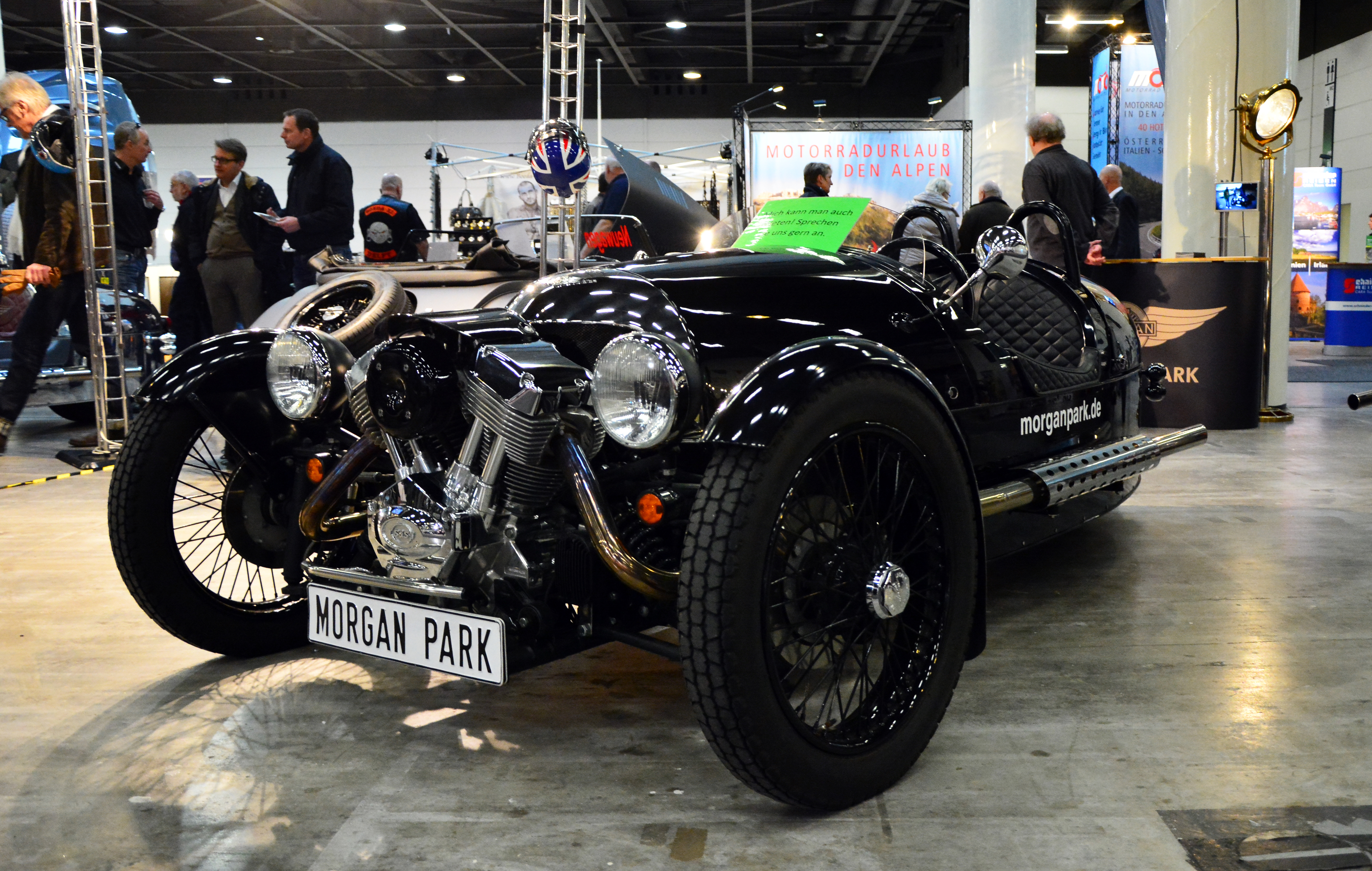 Morgan 3-Wheeler bei den Hamburger Motorrad Tagen 2015